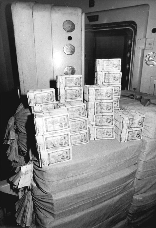 Berlin, Tresorraum der Staatsbank ADN-Senft 23.4.90 Berlin: Staasbank sortiert alte Banknoten aus- Die Staatsbank hat begonnen, aus den zentralen Tressoranlagen im Hause der Parlamentarier ( dem ehemaligen ZK-Gebäude, früher Reichsbank) eingelagerte Banknoten planmäßig auszusondern. Es handelt sich dabei um Geldscheine, die aus dem Verkehr gezogen und nicht mehr umlauffähig sind. Die Banknoten werden in einem außerhalb Berlins befindlichen Objekt vernichtet. Die Transporte im Umfang von Hunderten Tonnen erfolgen mit Technik der NVA unter polizeilichem Schutz.